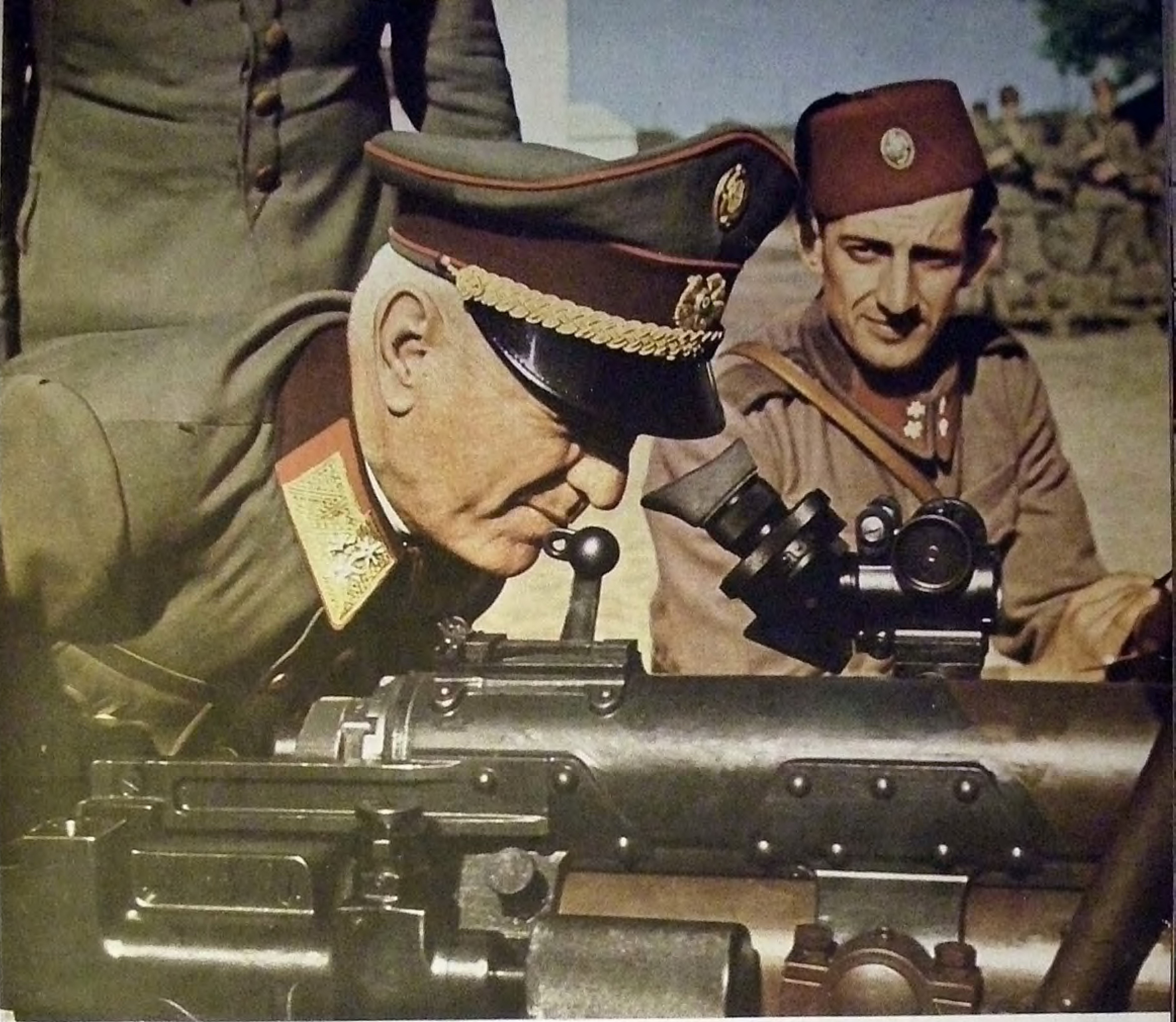 General Slavko Štancer